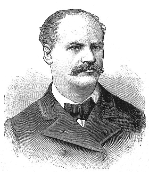 "Cornélius Herz."